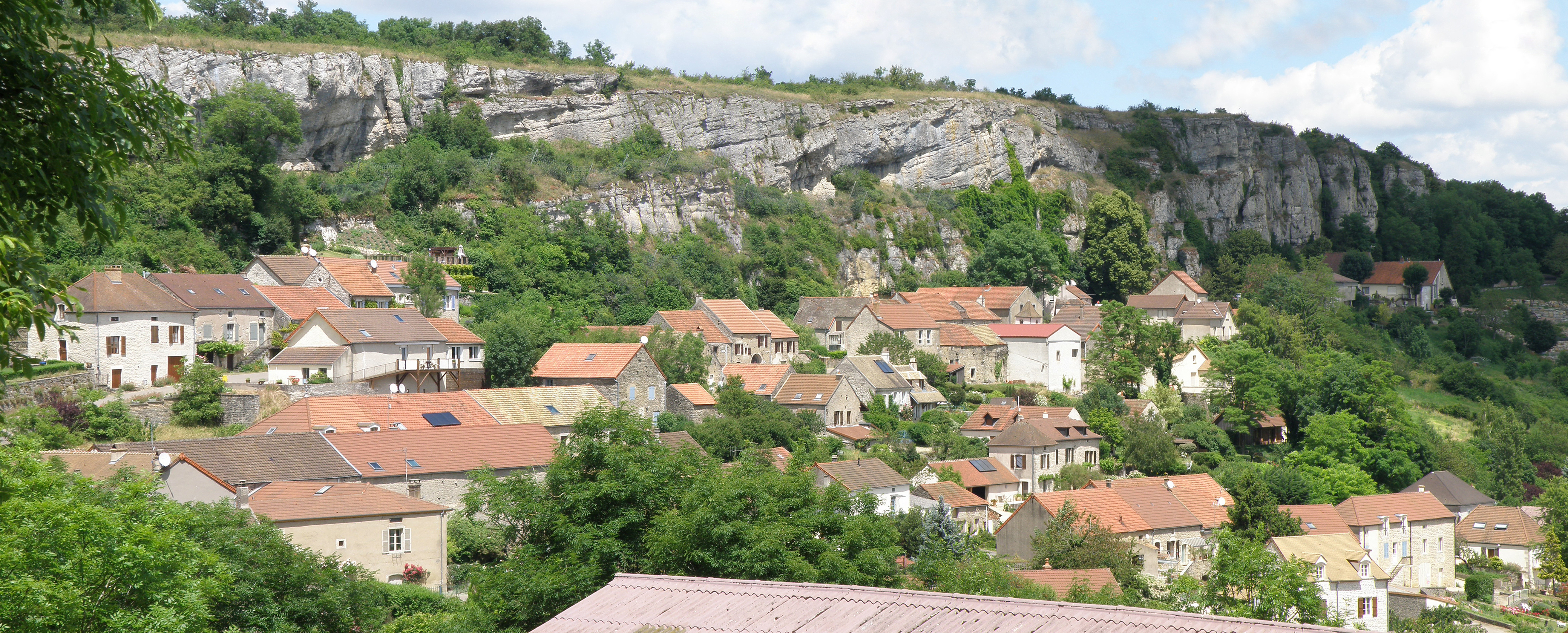 Baubigny (Côte-d'Or, Bourgogne, France). Vue générale du village d'Orches.